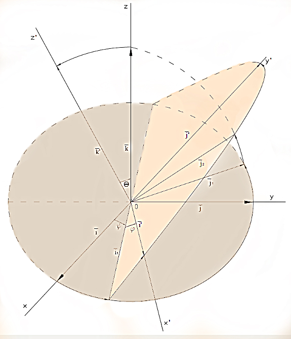 Ојлерови углови